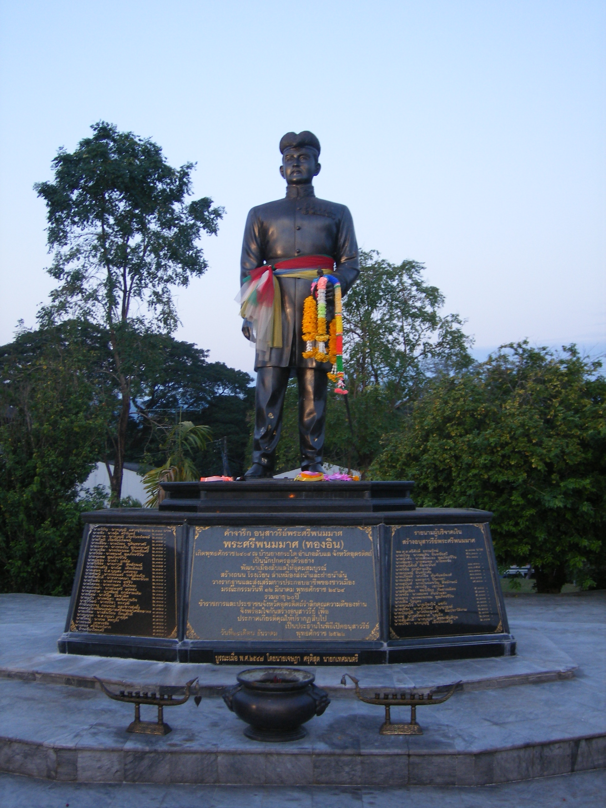 อนุสาวรีย์พระศรีพนมมาศ คนดีเมืองลับแล (Laplae, Uttaradit)